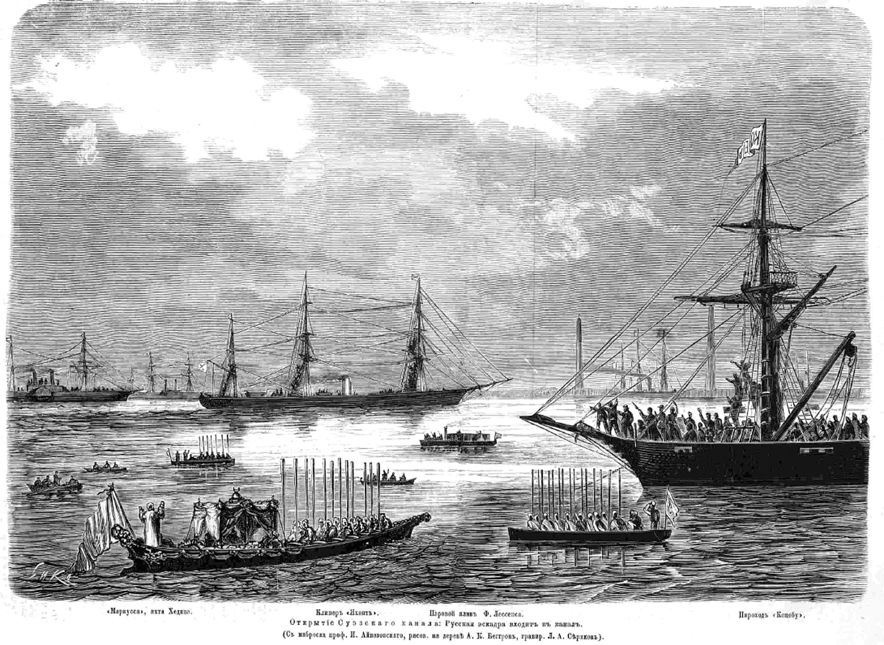 Русская эскадра входит в Суэцкий канал. "Всемирная Иллюстрация". С наброска И. Айвазовского, рисунок на дереве А. К. Беггрова, гравюра Л. А. Серякова